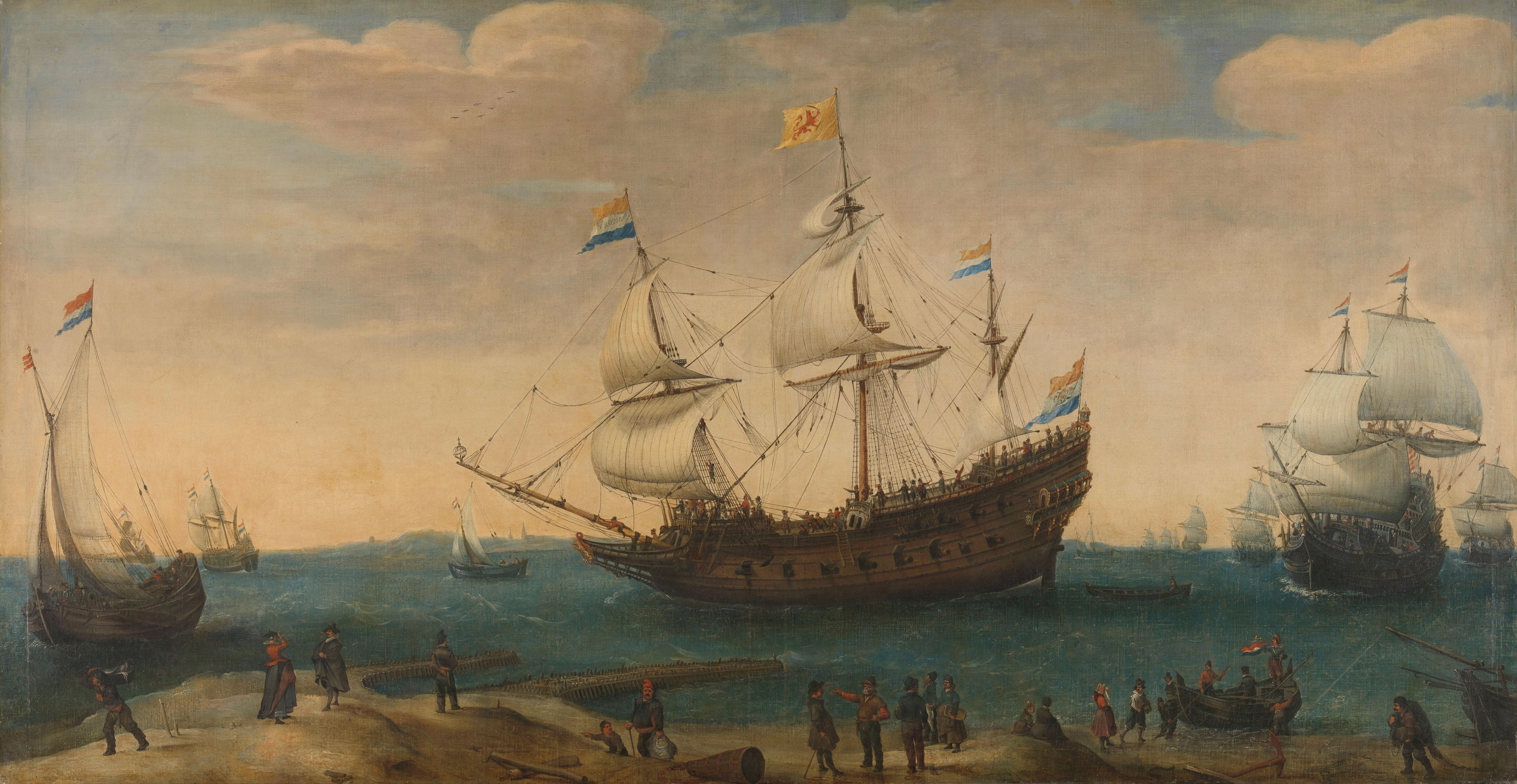 Mauritius. Fragment from Het uitzeilen van een aantal Oost-Indiëvaarders